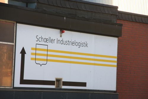 Logo der Fa. Schoeller-Industrielogistk